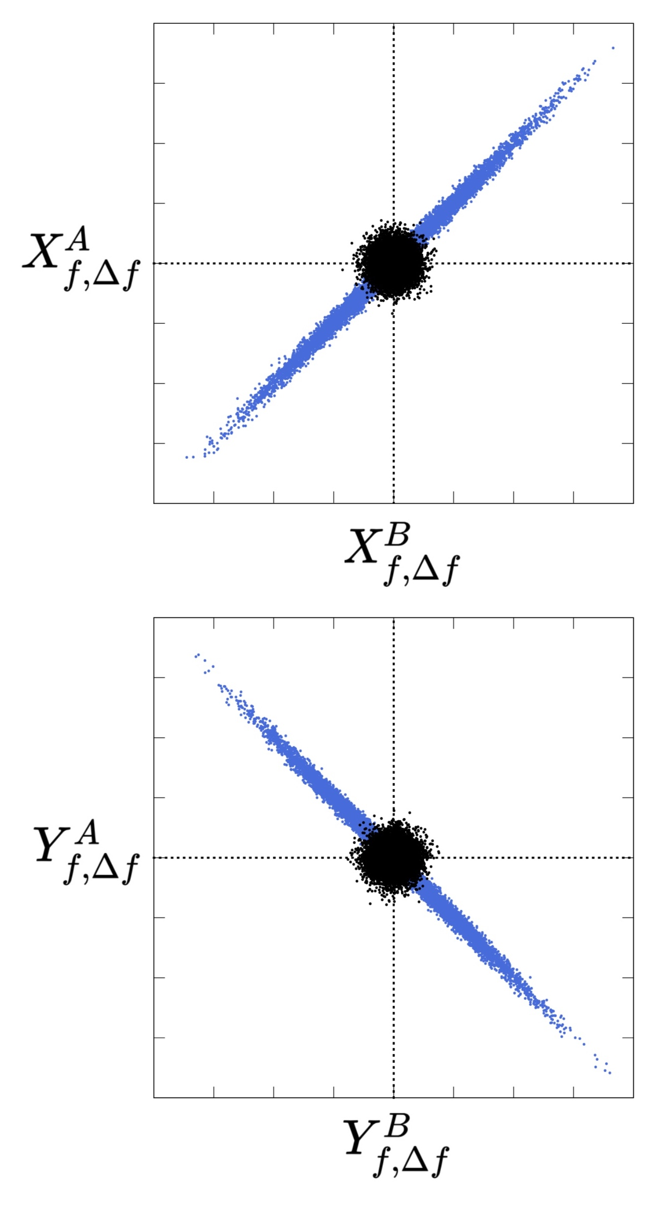 Die Messwerte bei A und B nehmen sehr unterschiedliche Werte an (angedeutet durch die Kreise). Ein Vergleich zeigt jedoch Korrelationen (oben) bzw. Anti-Korrelationen (unten). Die Werte liegen bei Verschränkung sogar enger zusammen als Werte, die am Grundzustand gemessen wurden (schwarz).